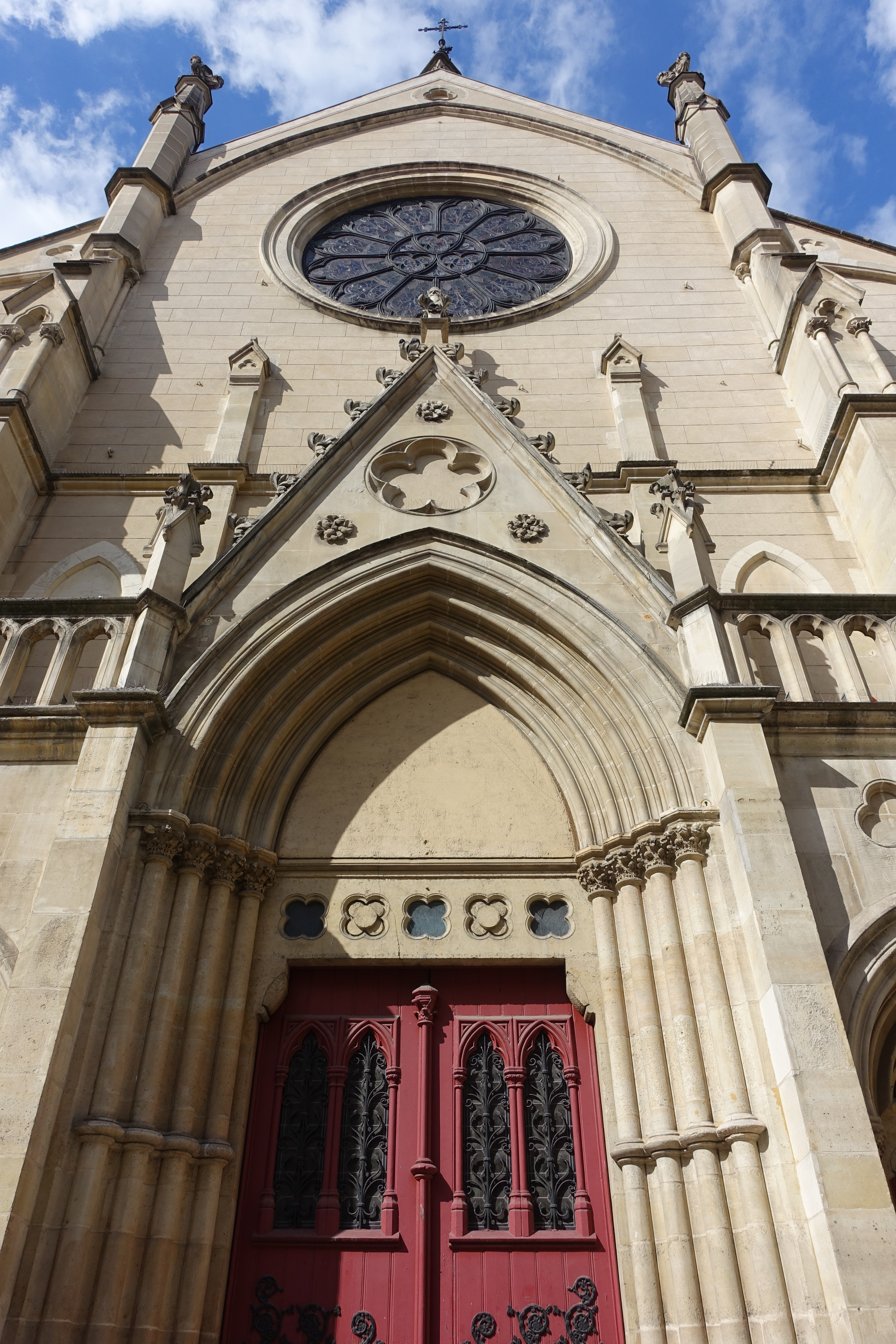 Eglise Saint Eugène Sainte Cécile @ Paris